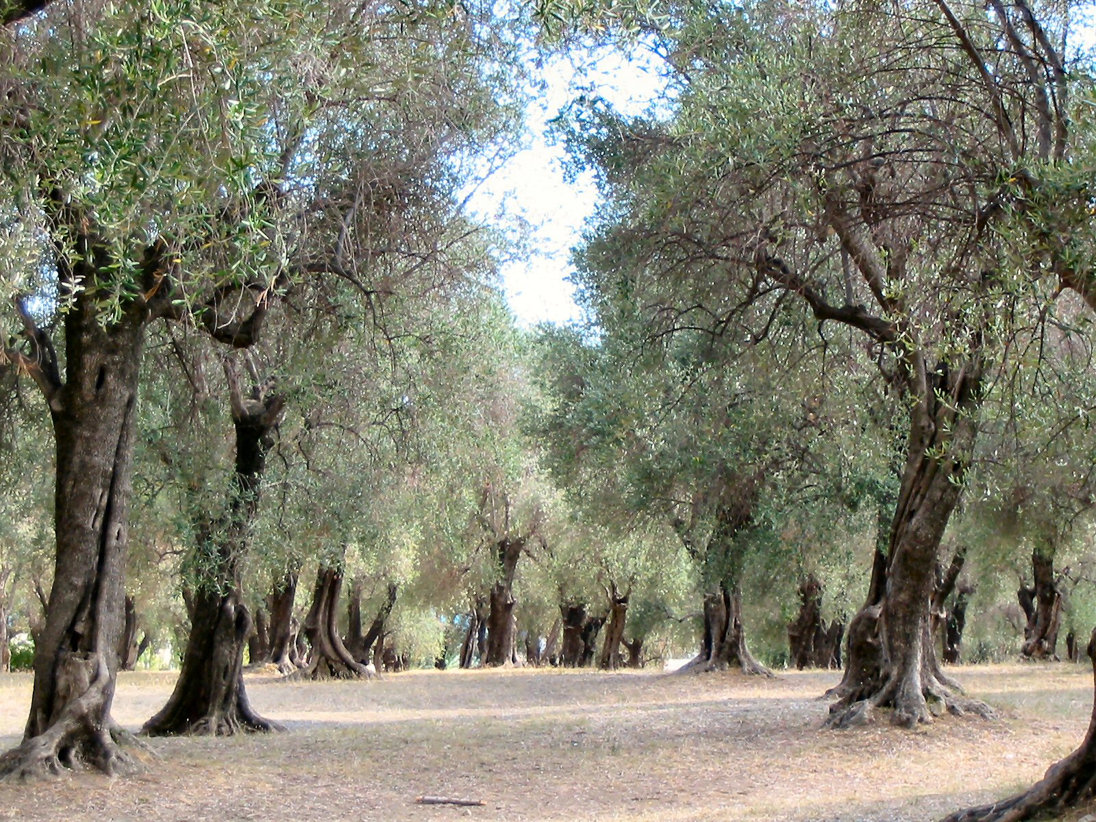 Description: Menton, Parc du Pian (oliveraie) Source: Utilisateur:vinbaron Licence